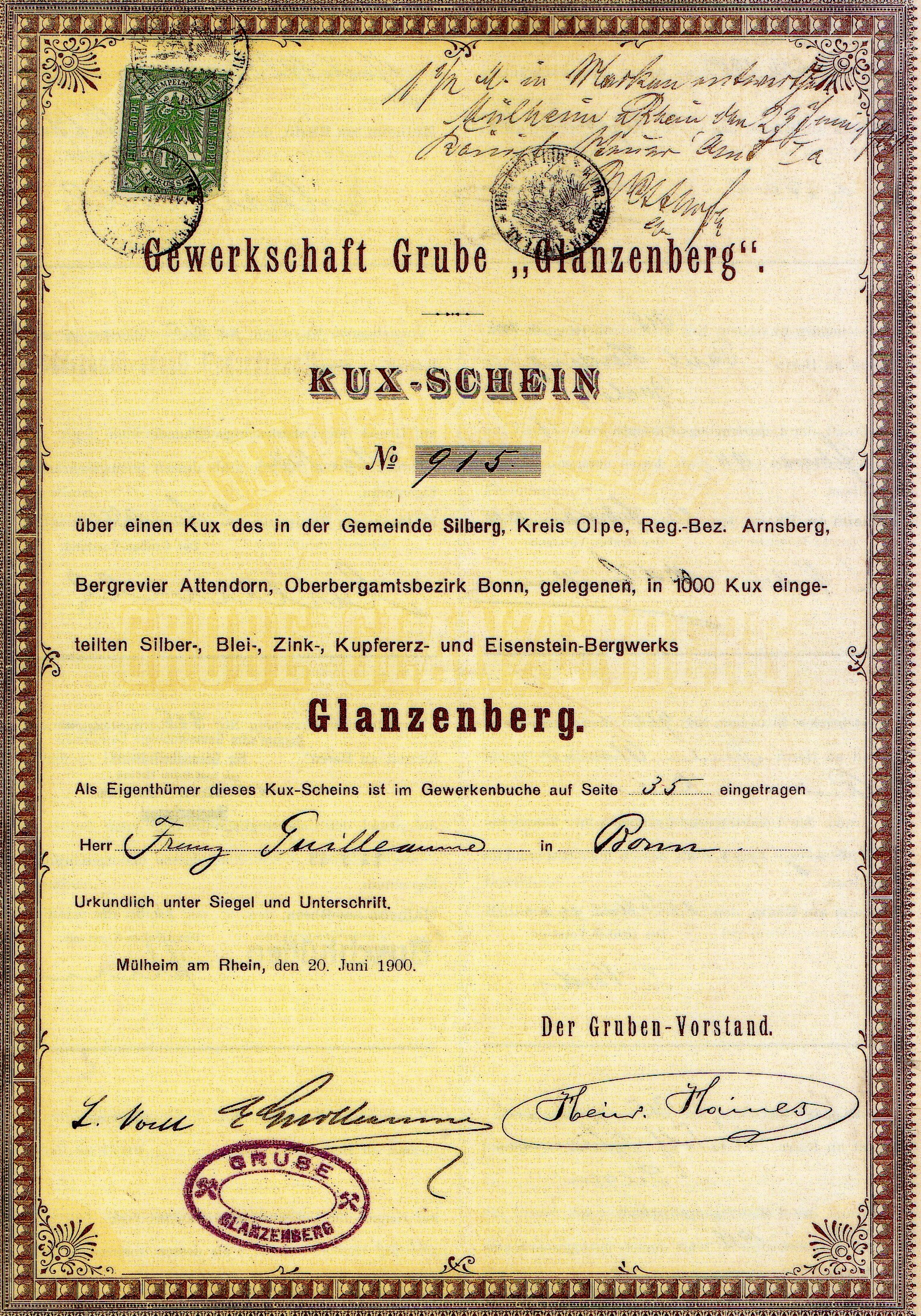 Kux-Schein der Grube Glanzenberg bei Silberg (Kreis Olpe) von 1900